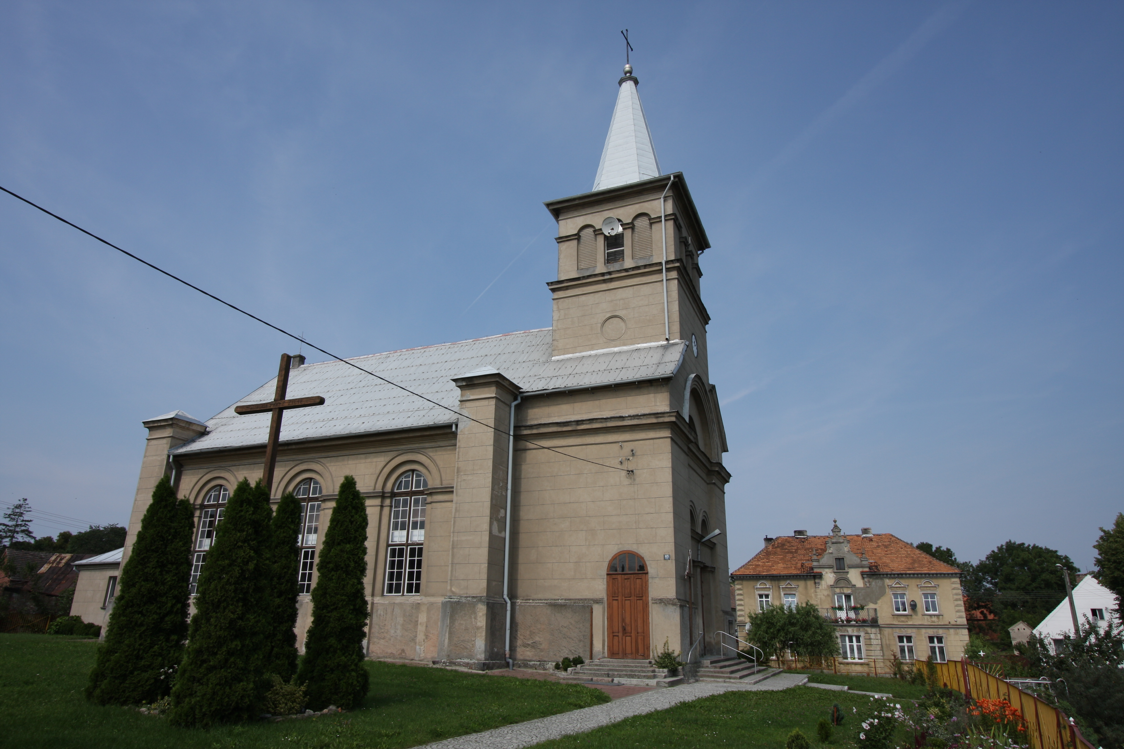 Rogoziniec, kościół ewangelicki, ob. rzym.-kat. fil. p.w. św. Józefa, mur., 1832